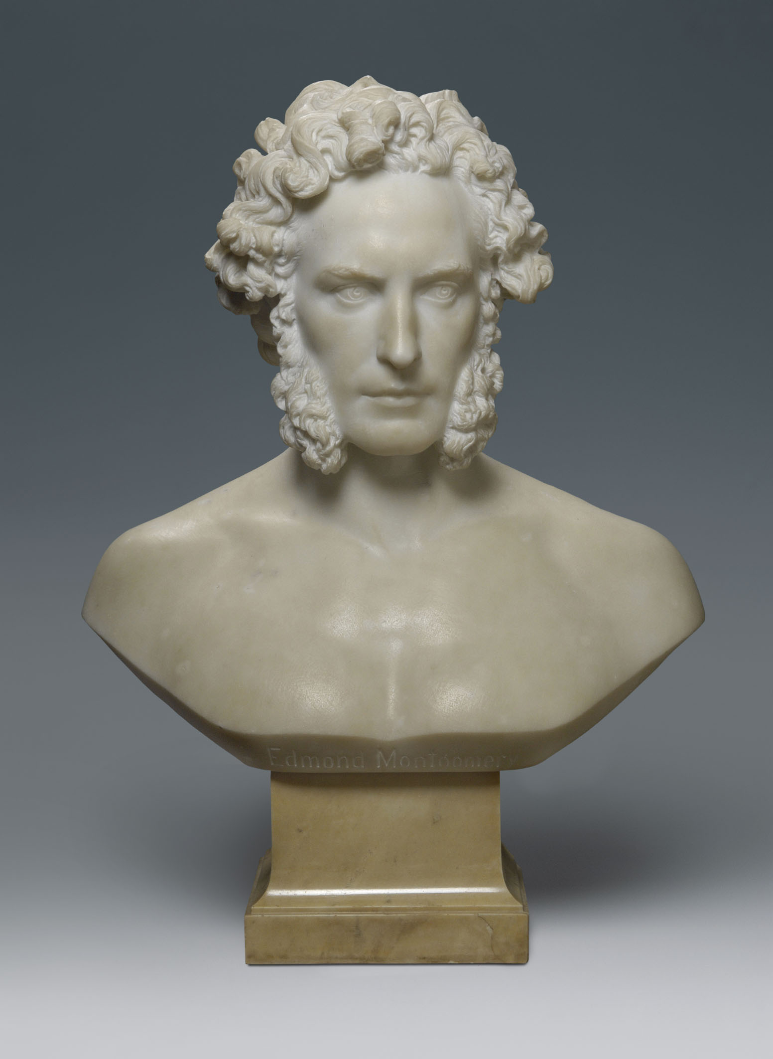 Das Bildnis ihres Gatten fertigte Elisabet Ney auf Madeira an.